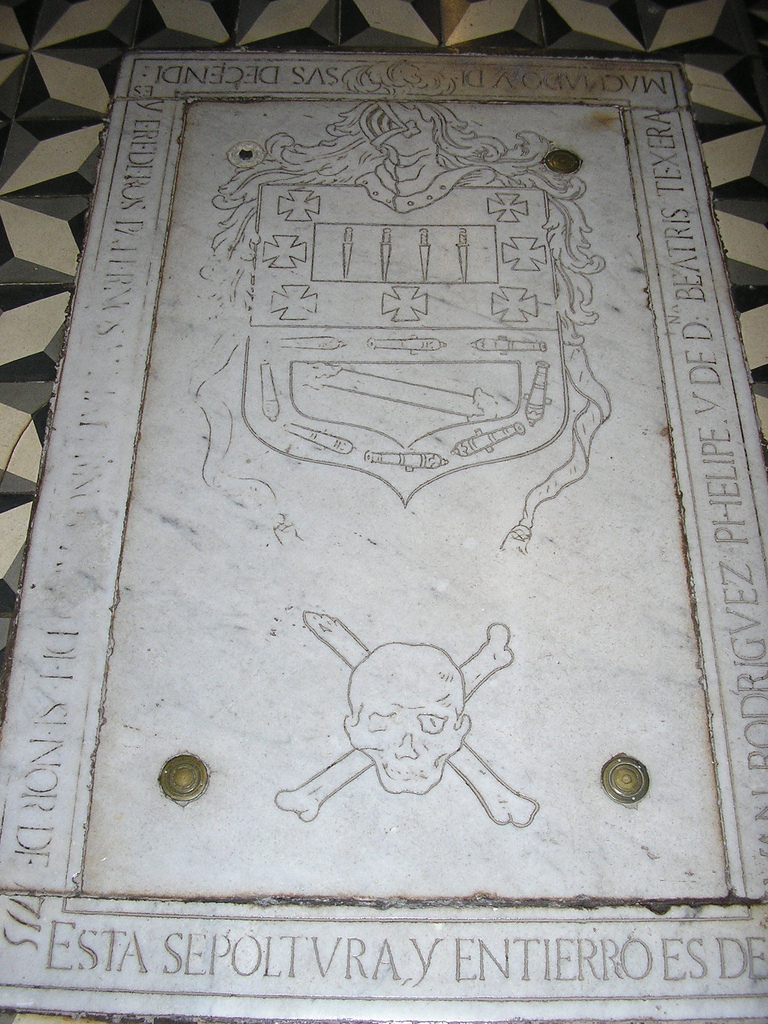 Lápida de la tumba de Amaro Pargo situada en la Parroquia de Santo Domingo de Guzmán en la ciudad de San Cristóbal de La Laguna (Tenerife, España).